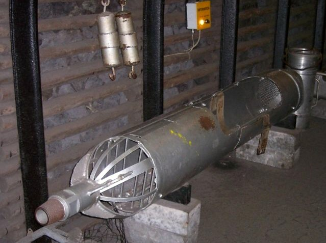 Rettungskapsel "Dahlbusch Bombe"